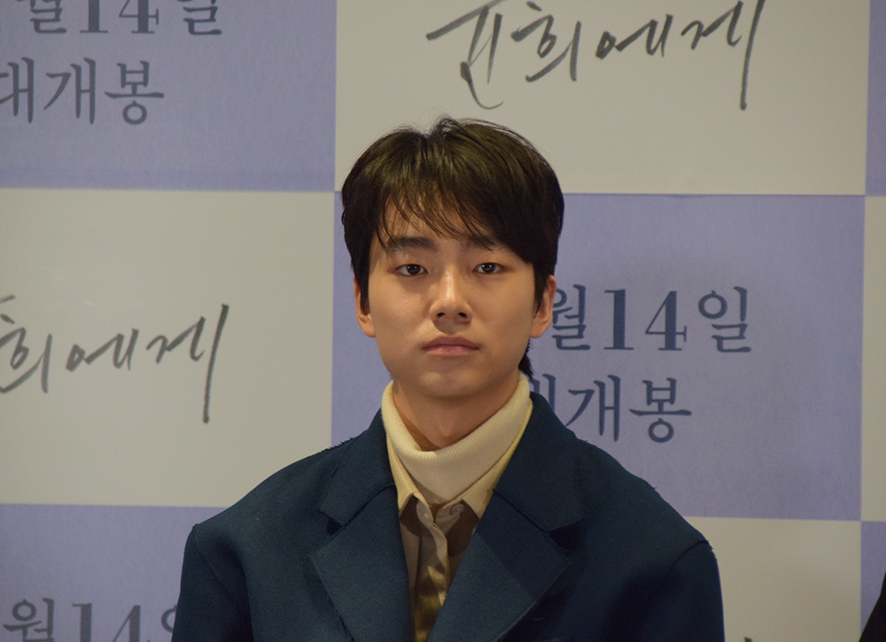 영화 '윤희에게' 시사회 현장 (2019.11.5 서울 롯데시네마건대입구)